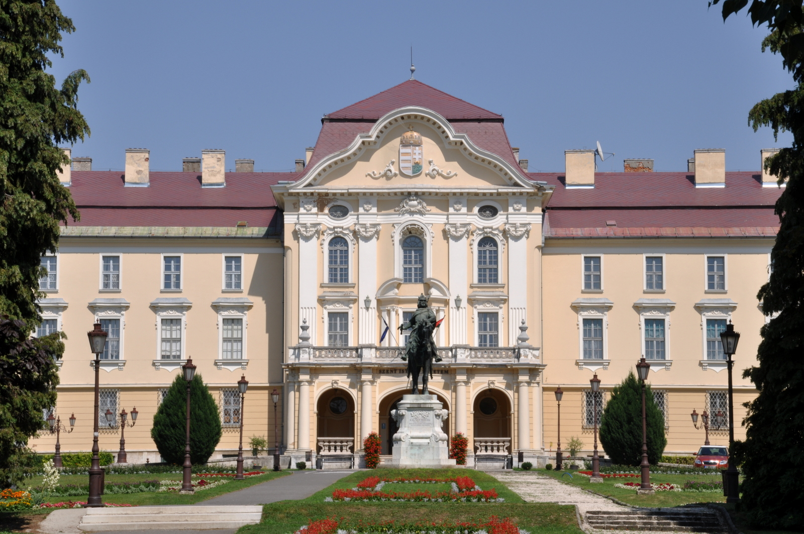 University of Gödöllő This is a photo of a monument in Hungary, Identifier: 15414